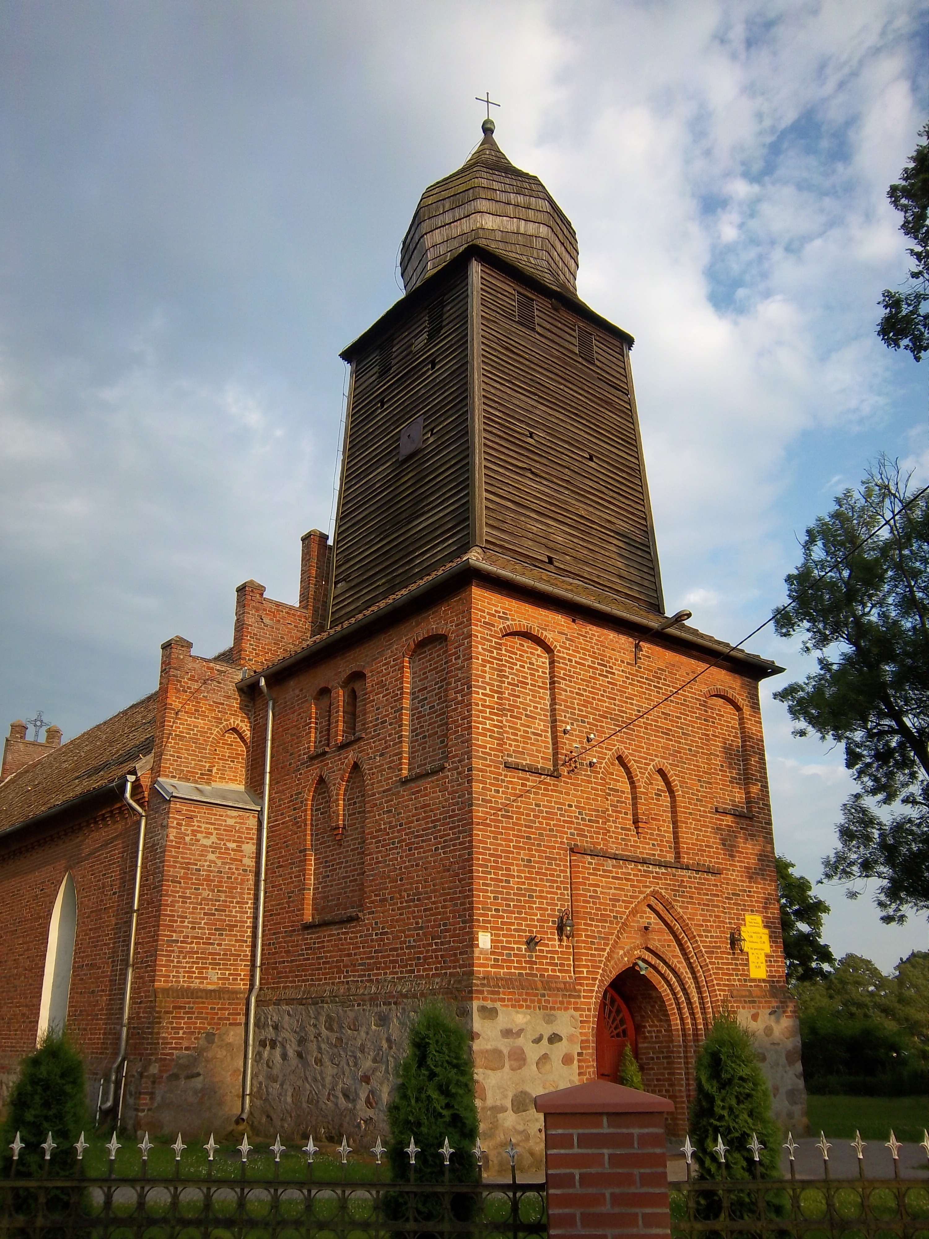 Kościół parafialny p.w. Matki Boskiej Częstochowskiej w Łukcie (wieża)